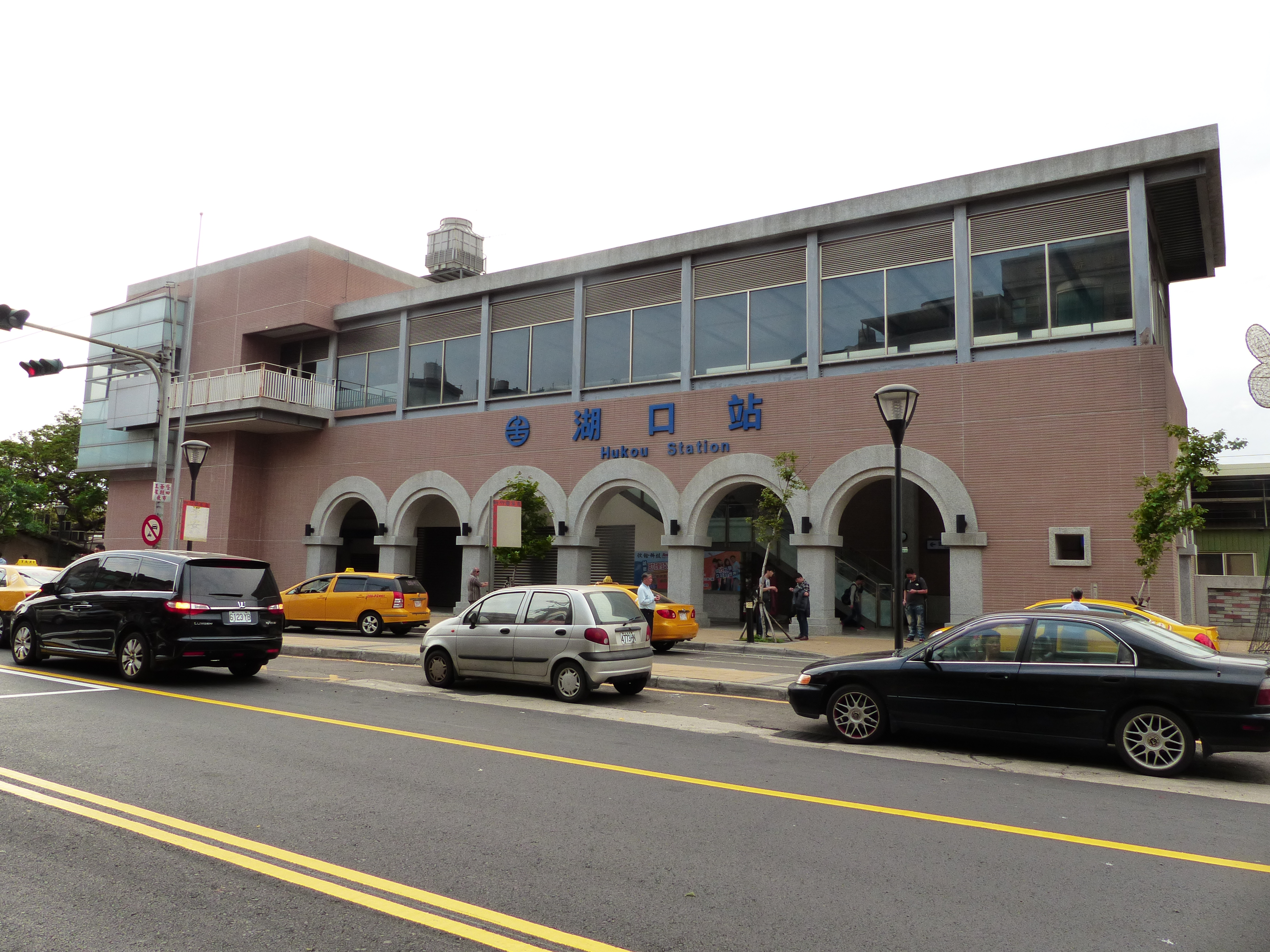 整建後的臺鐵湖口車站東口。